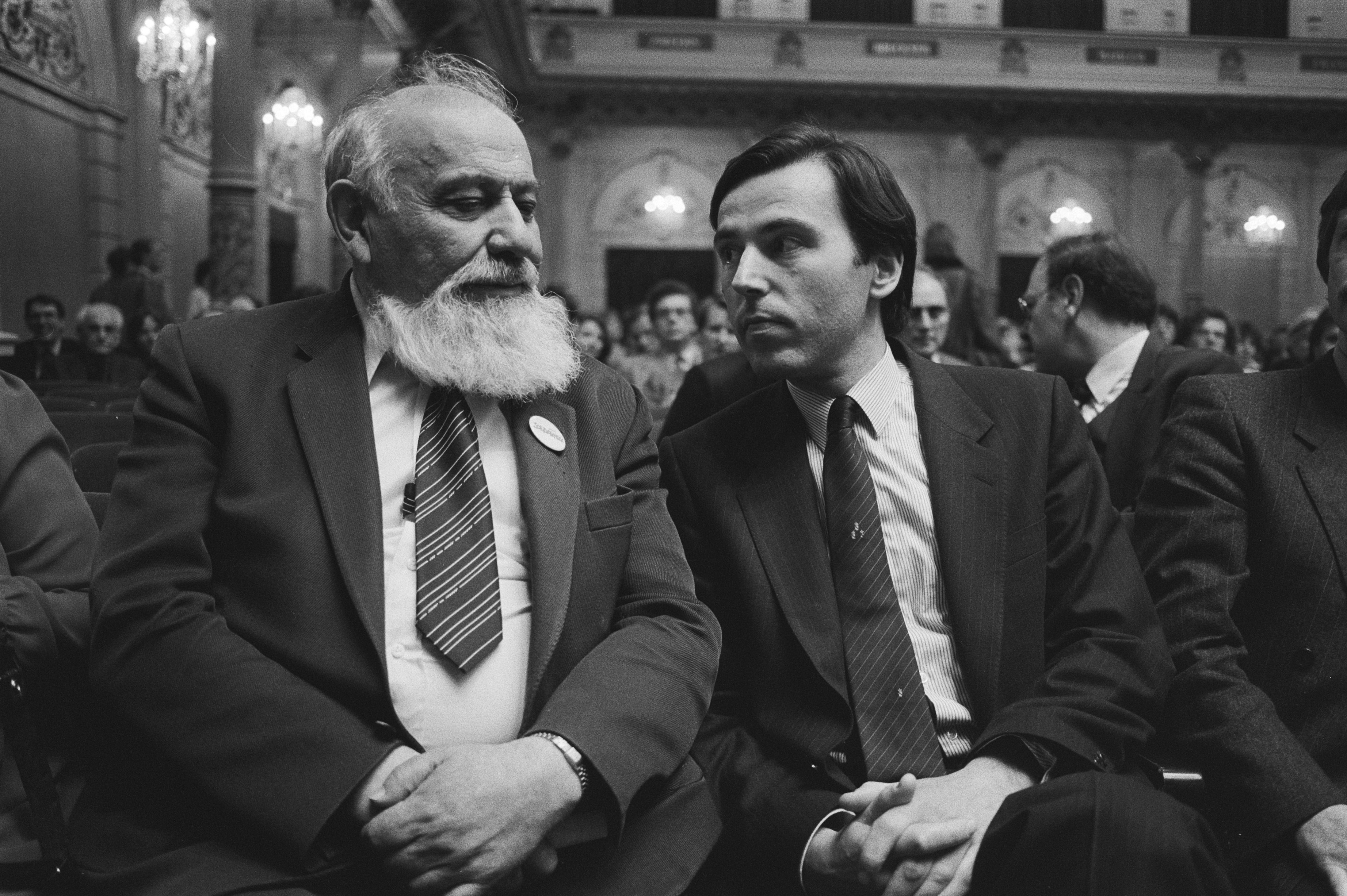 Collectie / Archief : Fotocollectie Anefo Reportage / Serie : [ onbekend ] Beschrijving : Benefietconcert voor Russische dissident Sacharov in Concertgebouw Amsterdam; Minister Brinkman (WVC) in gesprek met Kopelen (vriend van Sacharov) / Datum : 24 mei 1984 Locatie : Amsterdam, Noord-Holland Trefwoorden : CONCERTGEBOUWEN, GESPREKKEN, politici Persoonsnaam : Brinkman, Elco Fotograaf : Antonisse, Marcel / Anefo Auteursrechthebbende : Nationaal Archief Materiaalsoort : Negatief (zwart/wit) Nummer archiefinventaris : bekijk toegang 2.24.01.05 Bestanddeelnummer : 932-9796